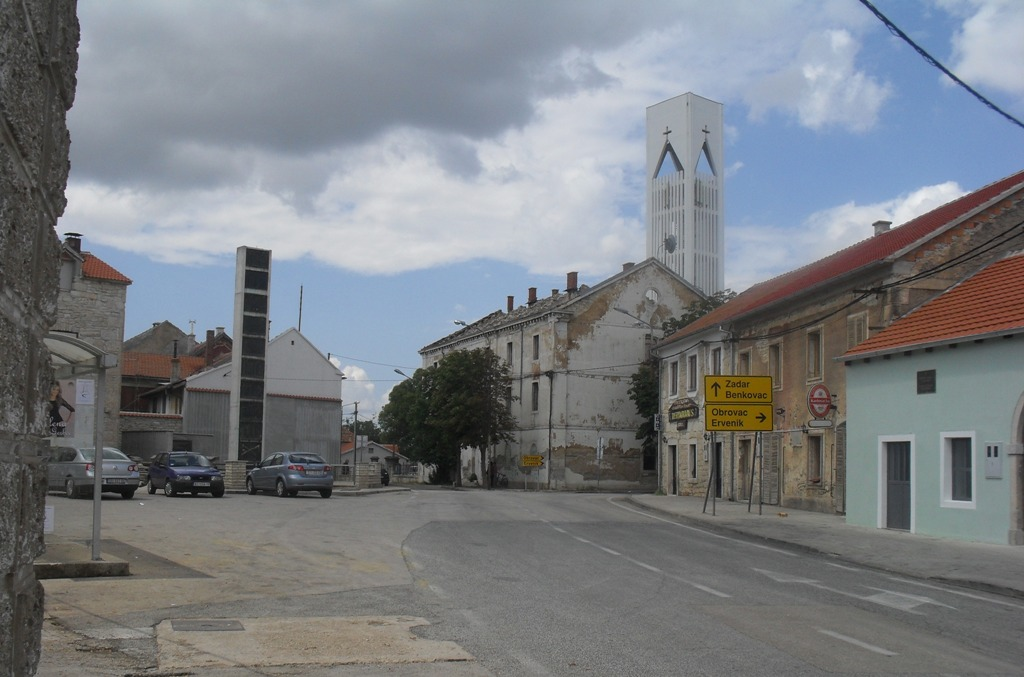 Središte Kistanja, u Šibensko-kninskoj županiji.